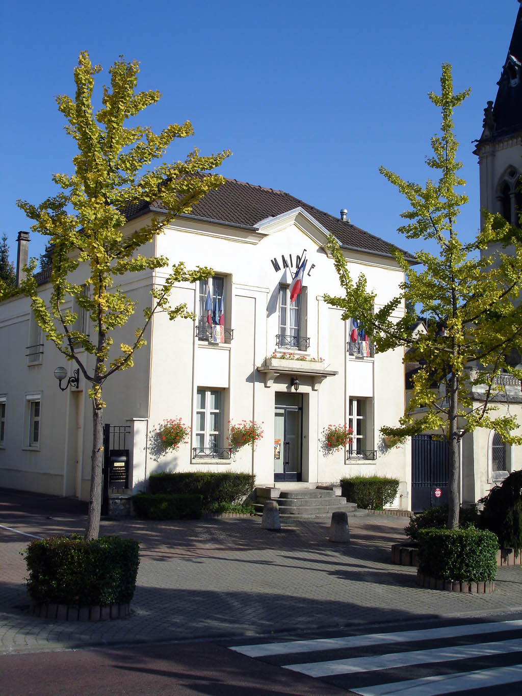 La mairie de Montlignon (Val-d'Oise), France